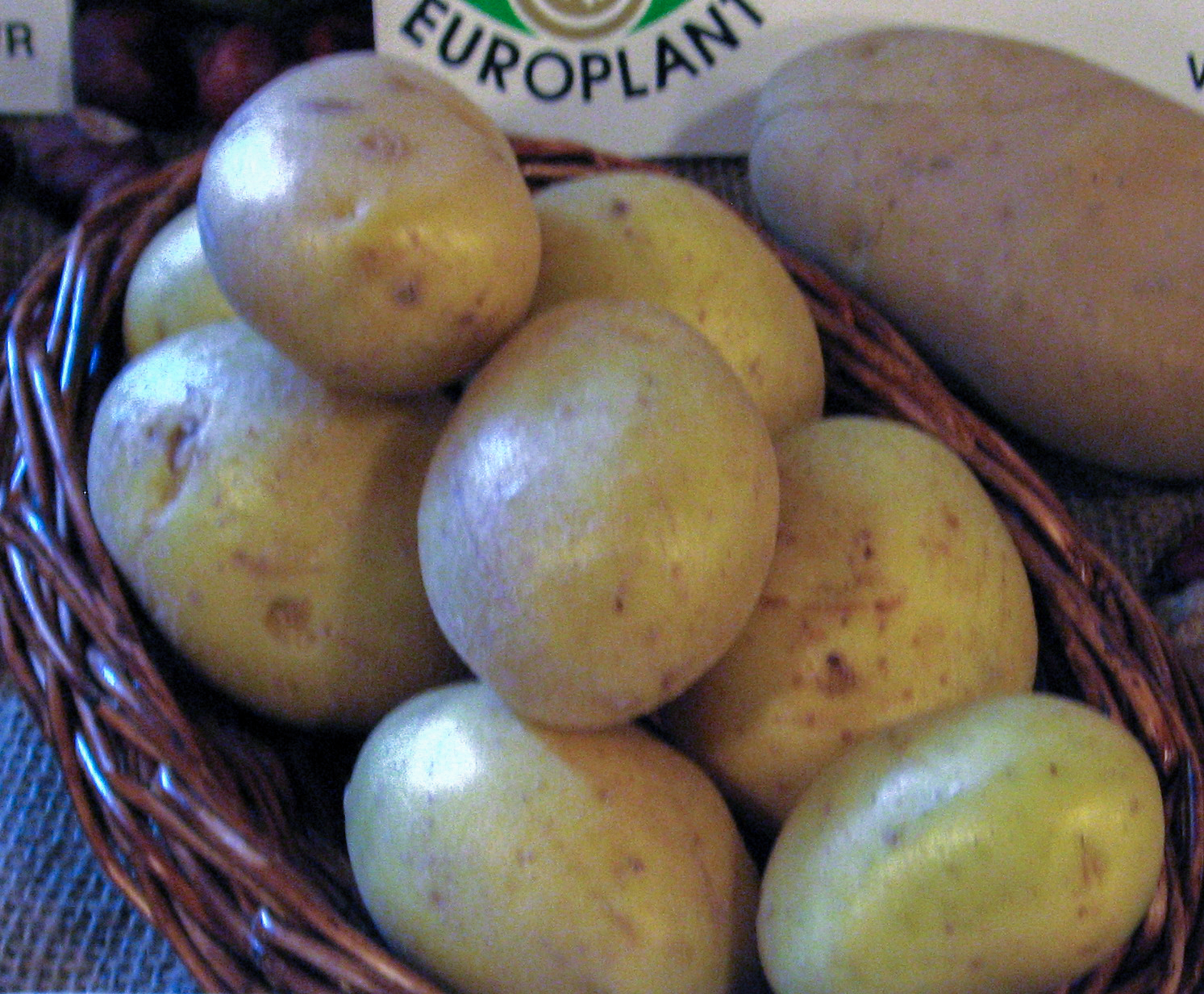 odrůda Finka